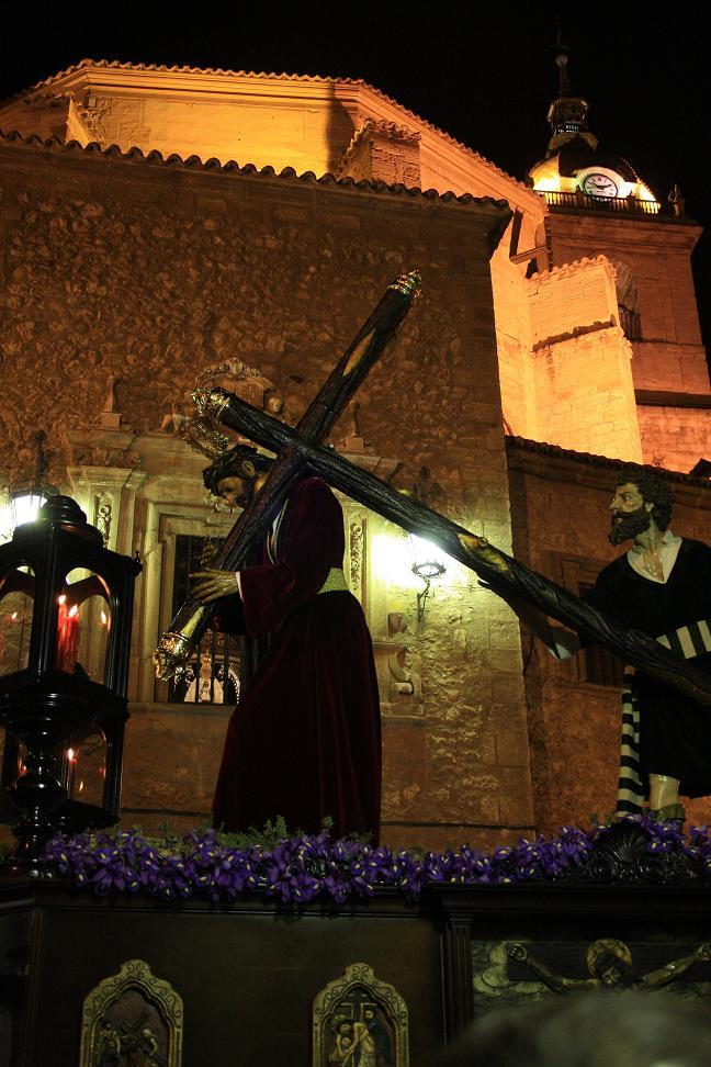 El Señor de las Penas por la Catedral de Ciudad Real